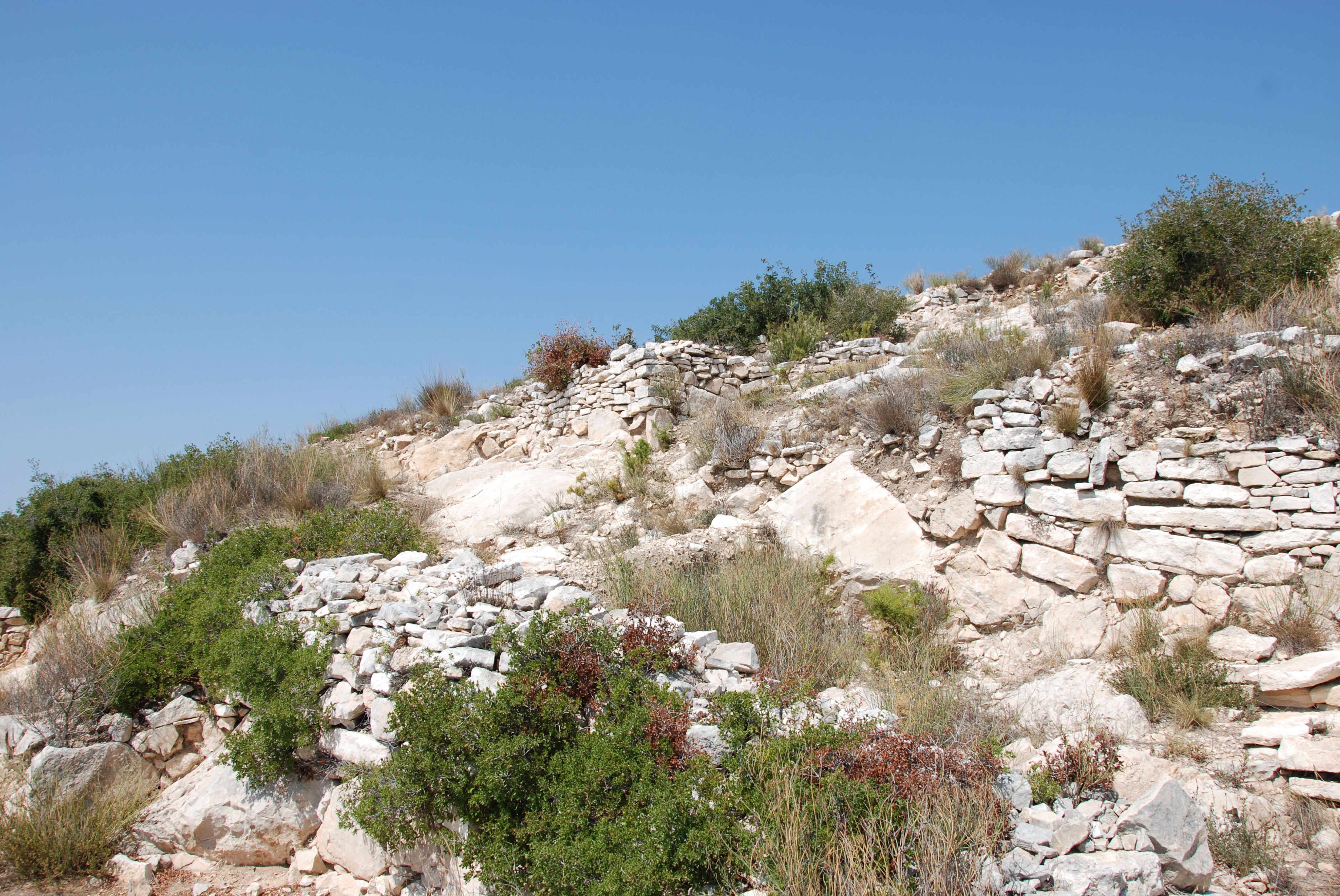 Oppidum de verduron, 15eme arrondissement de marseille